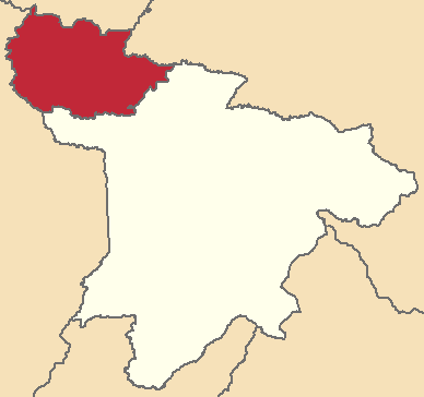 Mapa localizador del cantón en Santo Domingo, Ecuador